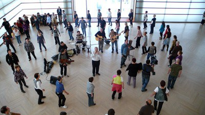 dantzan oskorri